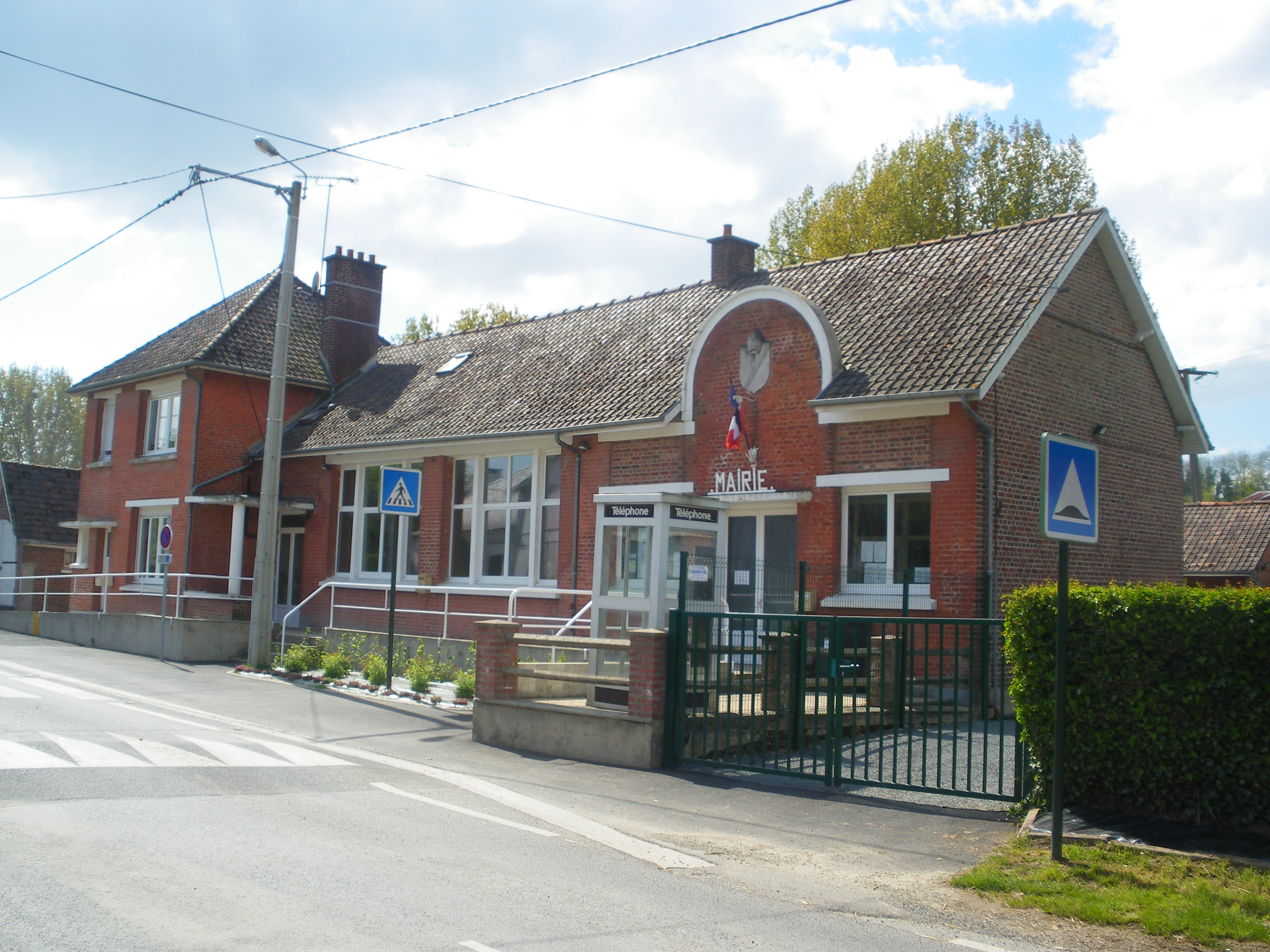 Vue de la mairie de Saint-Rémy-au-Bois.